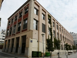 Arxiu Comarcal del Vallès Occidental